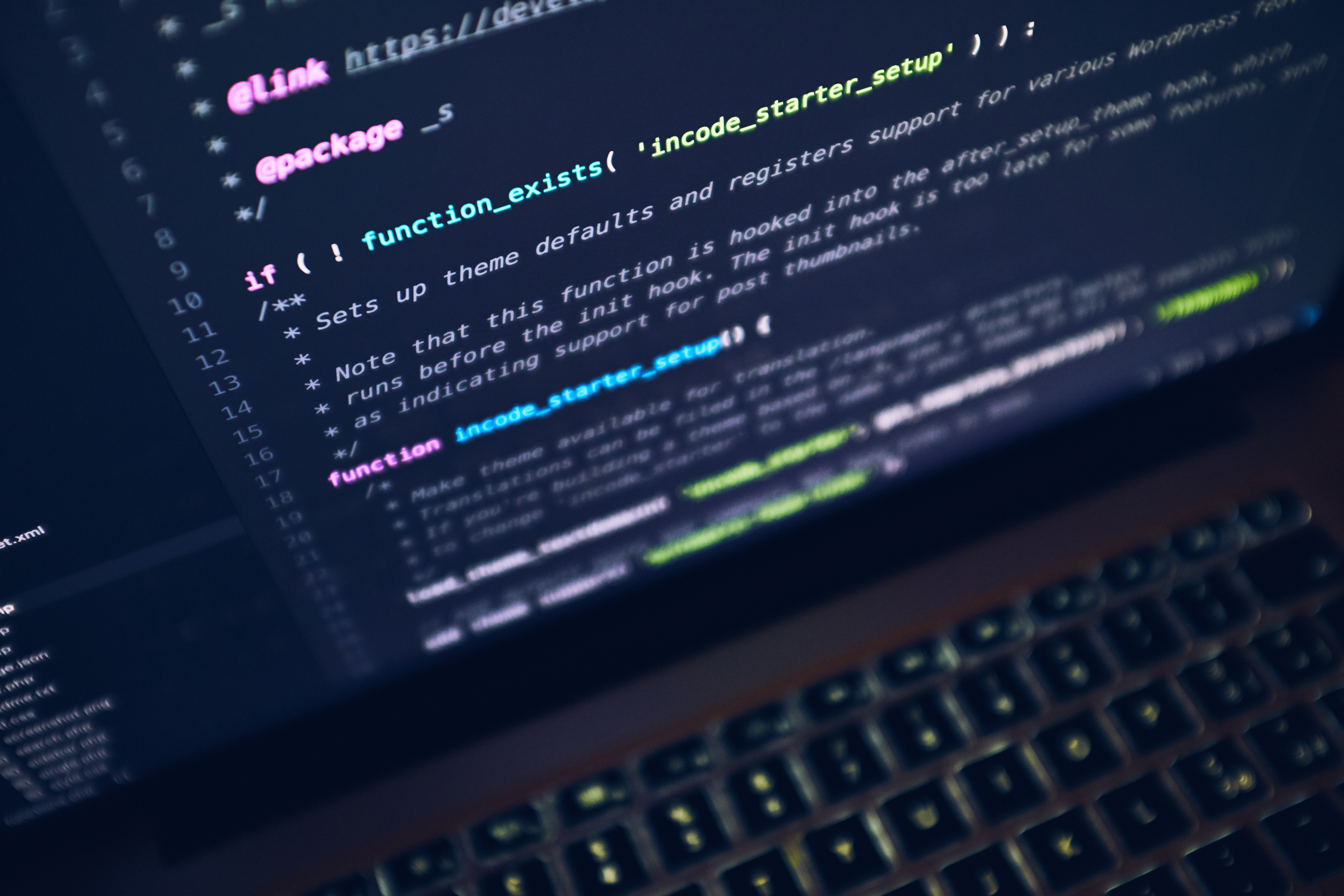 Portátil con un IDE y un archivo escrito en lenguaje de programación PHP